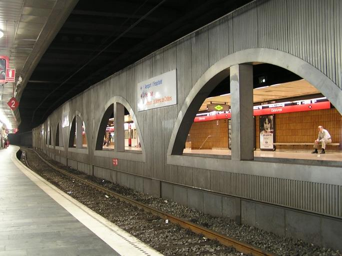 Plaça Catalunya is probably the busiest train station in Barcelona downtown. L’estació de Plaça Catalunya és, probablement, la més utilitzada de Barcelona.